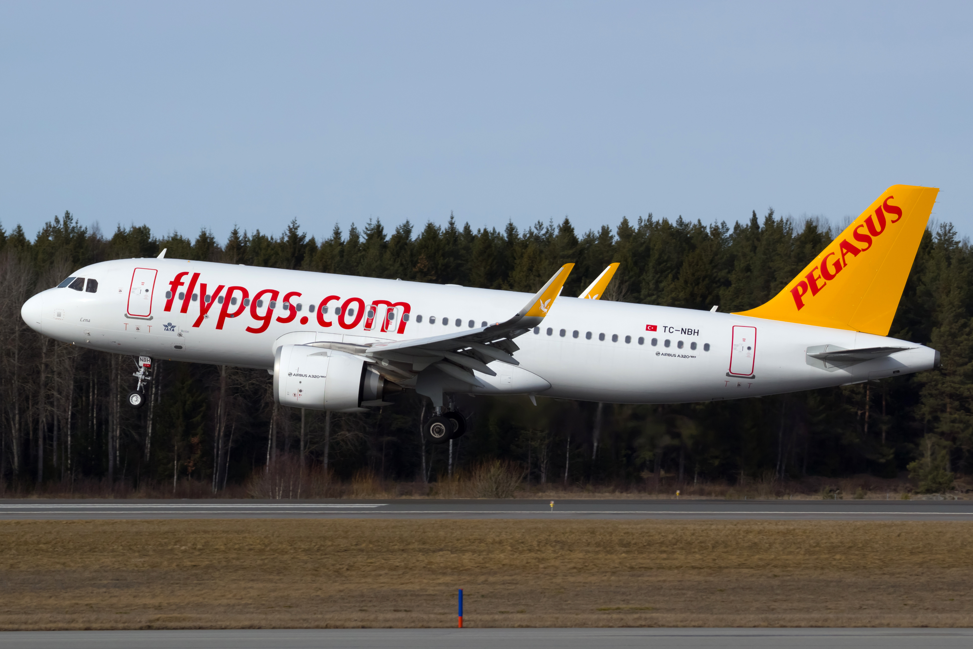 Airbus A320neo de Pegasus aterrando no aeroporto de Estocolmo-Arlanda.